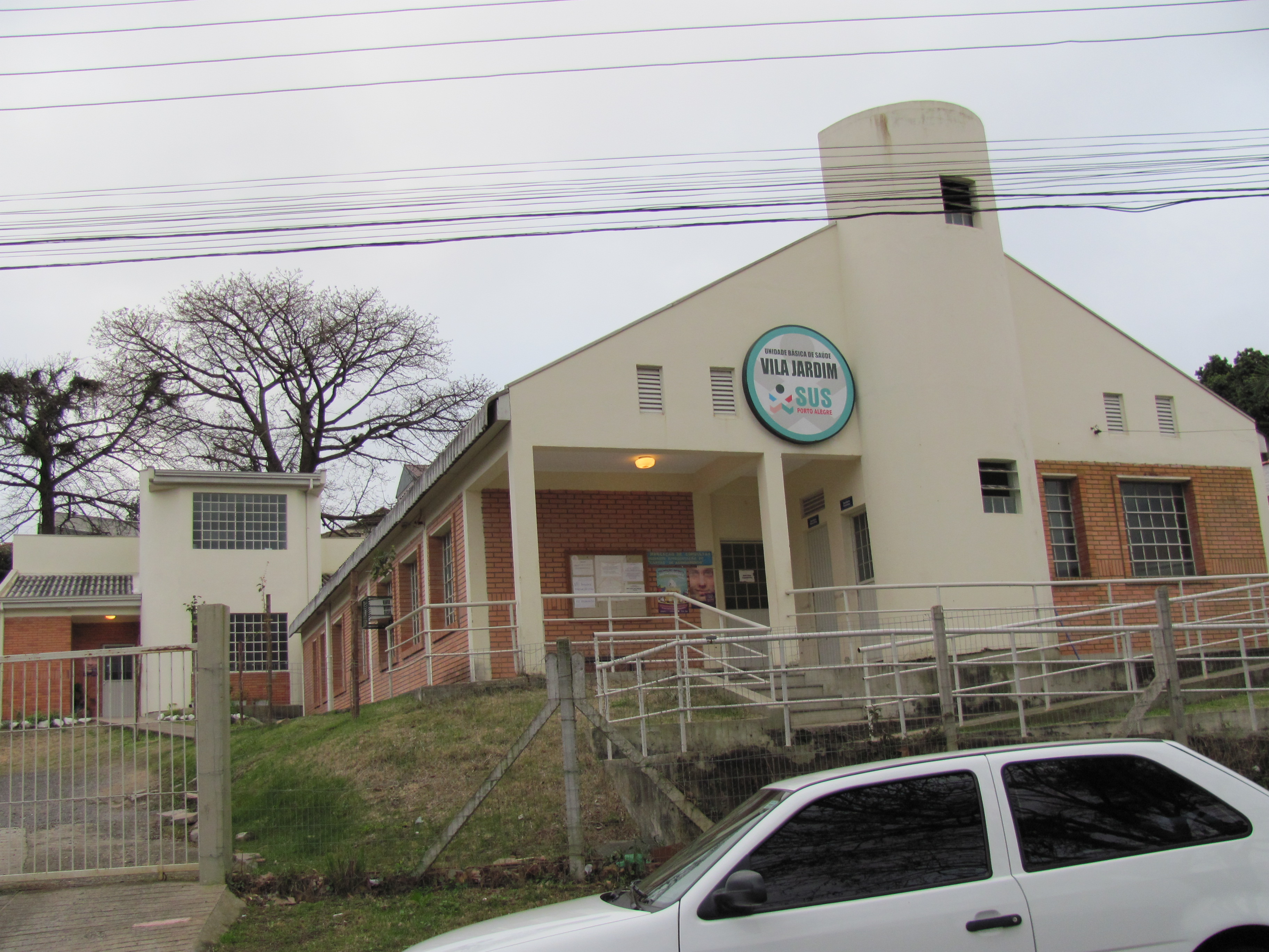 Posto de Saúde em Porto Alegre - Vila Bom Jesus